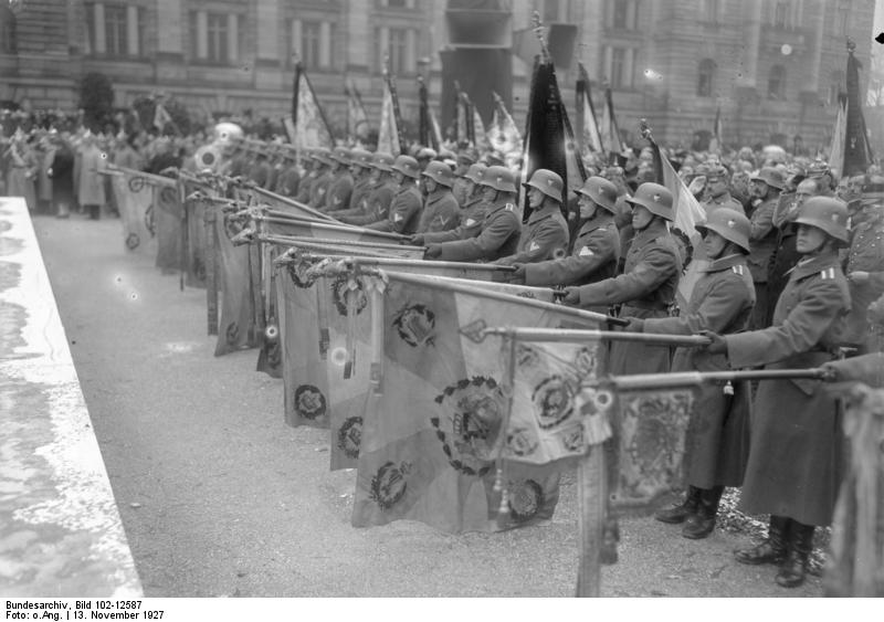 Die grosse Trauerfeier für die im Weltkriege gefallenen 13000 Helden der bayerischen Armee fand am 13. November [1927] am Gefallenen-Denkmal in München statt. Anwesend waren Vertreter der bayerischen Regierung sowie Mitglieder des ehemaligen bayerischen Fürstenhauses. Eine Traditionskompanie der Reichswehr leistete die Ehrenbezeugungen. Die alten Fahnen der bayerischen Armee senken sich zum Zeichen der Trauer während der Feier